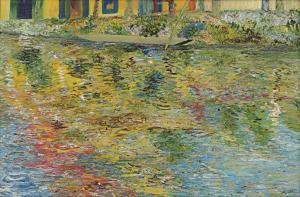 Oleo de 40 x 60.6 cm